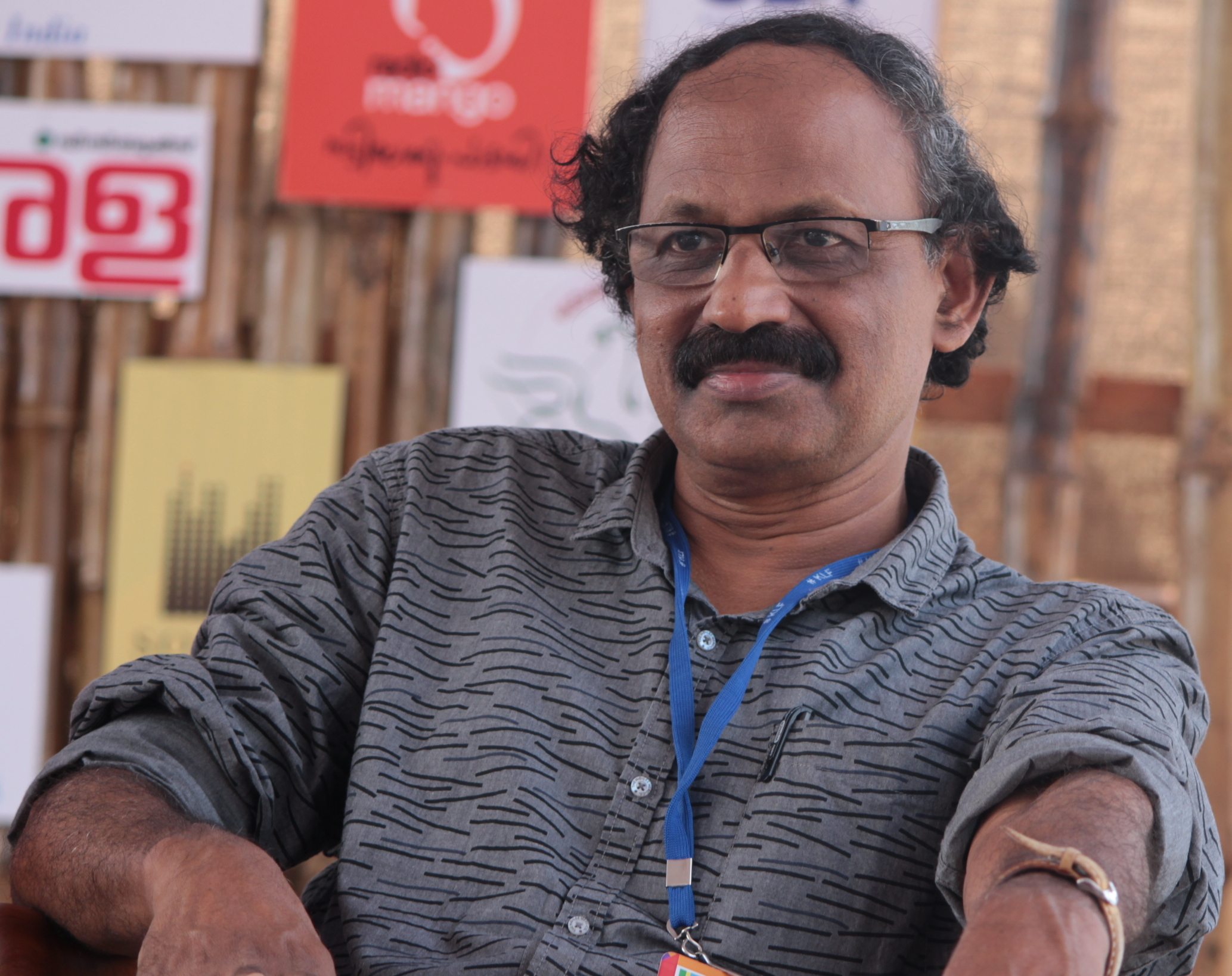 അംബികാസുതന്‍ മാങ്ങാട് 2017 ഫെബ്രുവരി 5ന് കോഴിക്കോട് നടന്ന ലിറ്ററേച്ചര്‍ ഫെസ്റ്റിവലില്‍